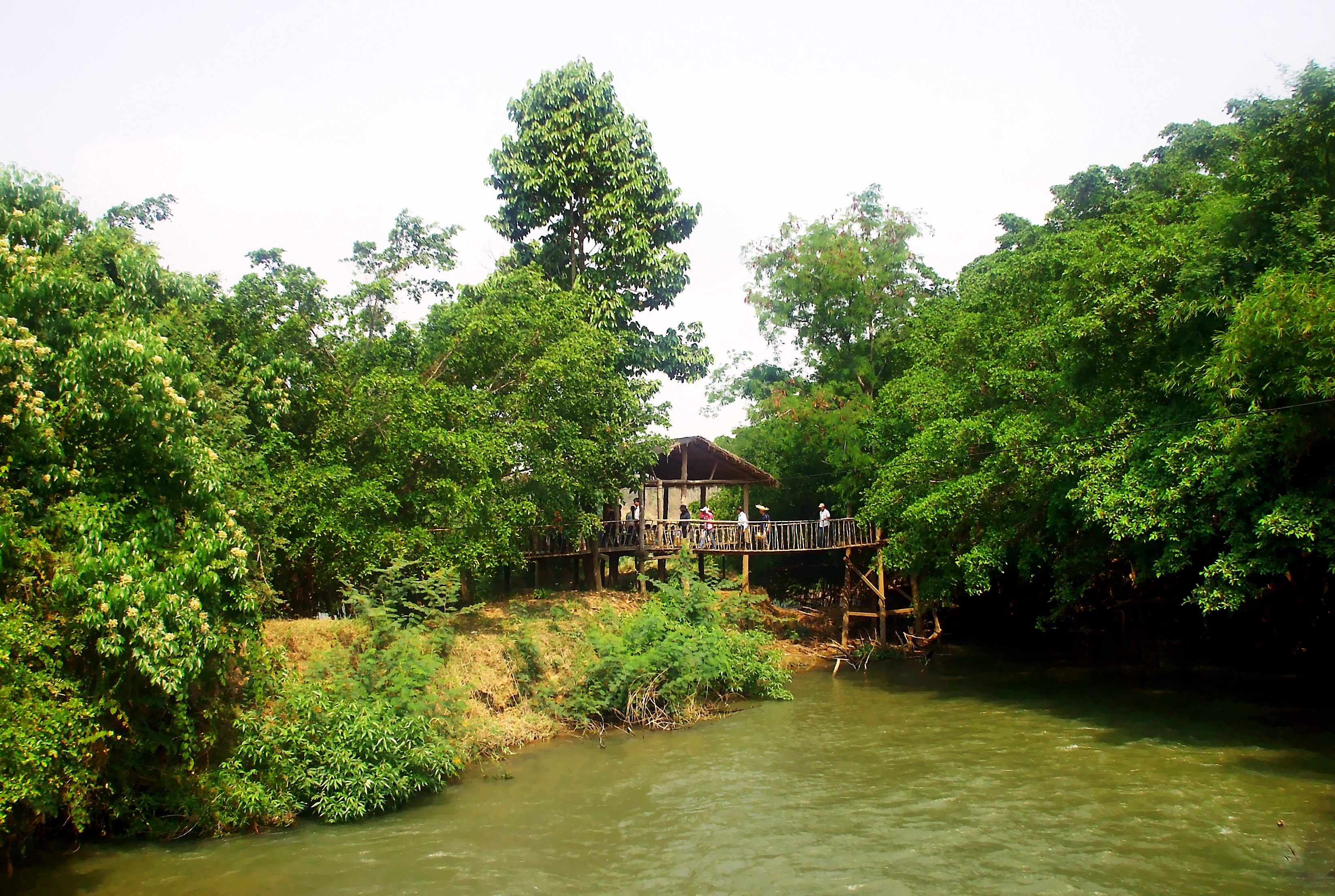 Một cảnh trong khu du lịch ở Bản Đôn thuộc tỉnh Đắk Lắk, Việt Nam.